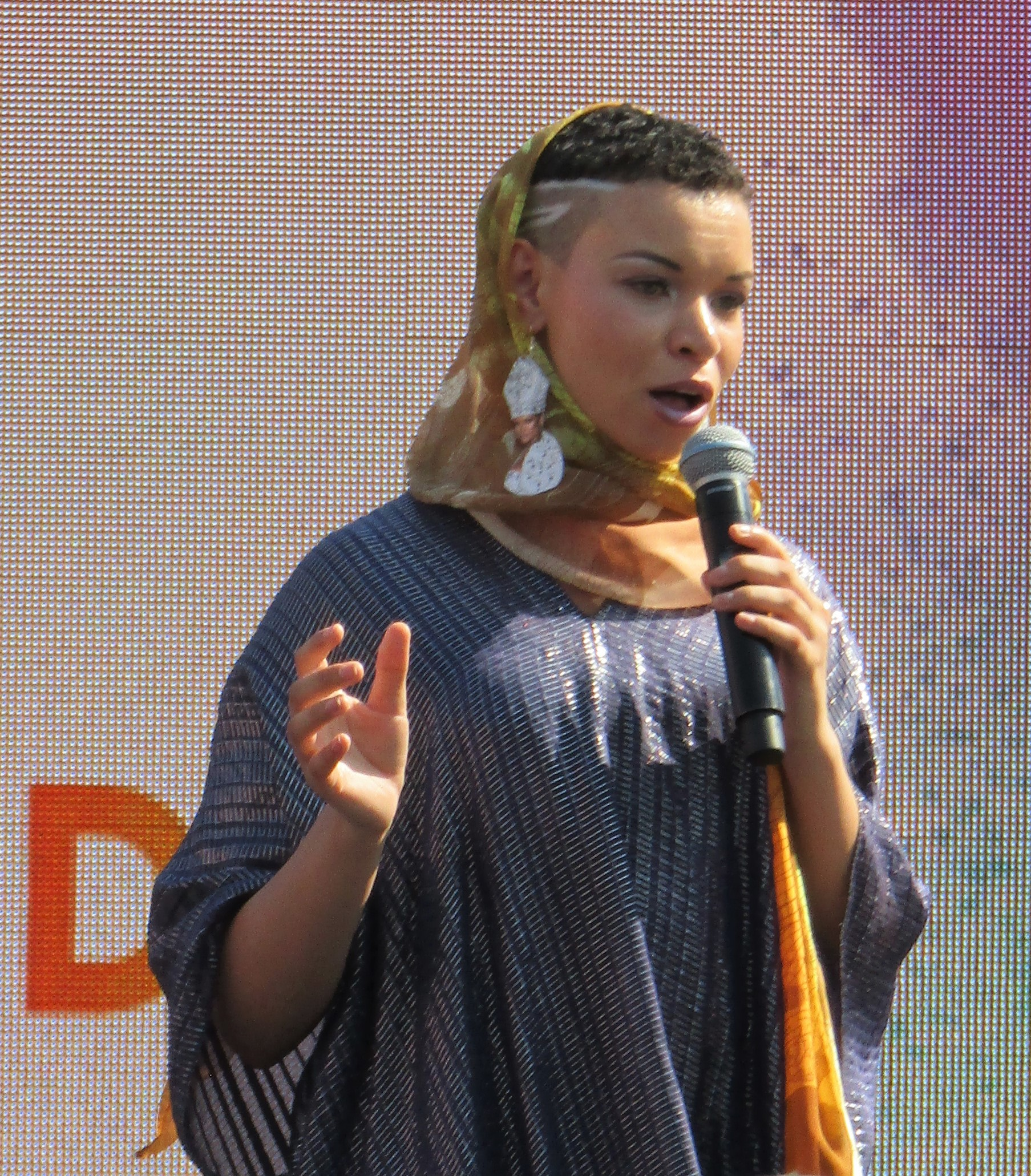 Blair Imani speaking at LoveLoud 2018.